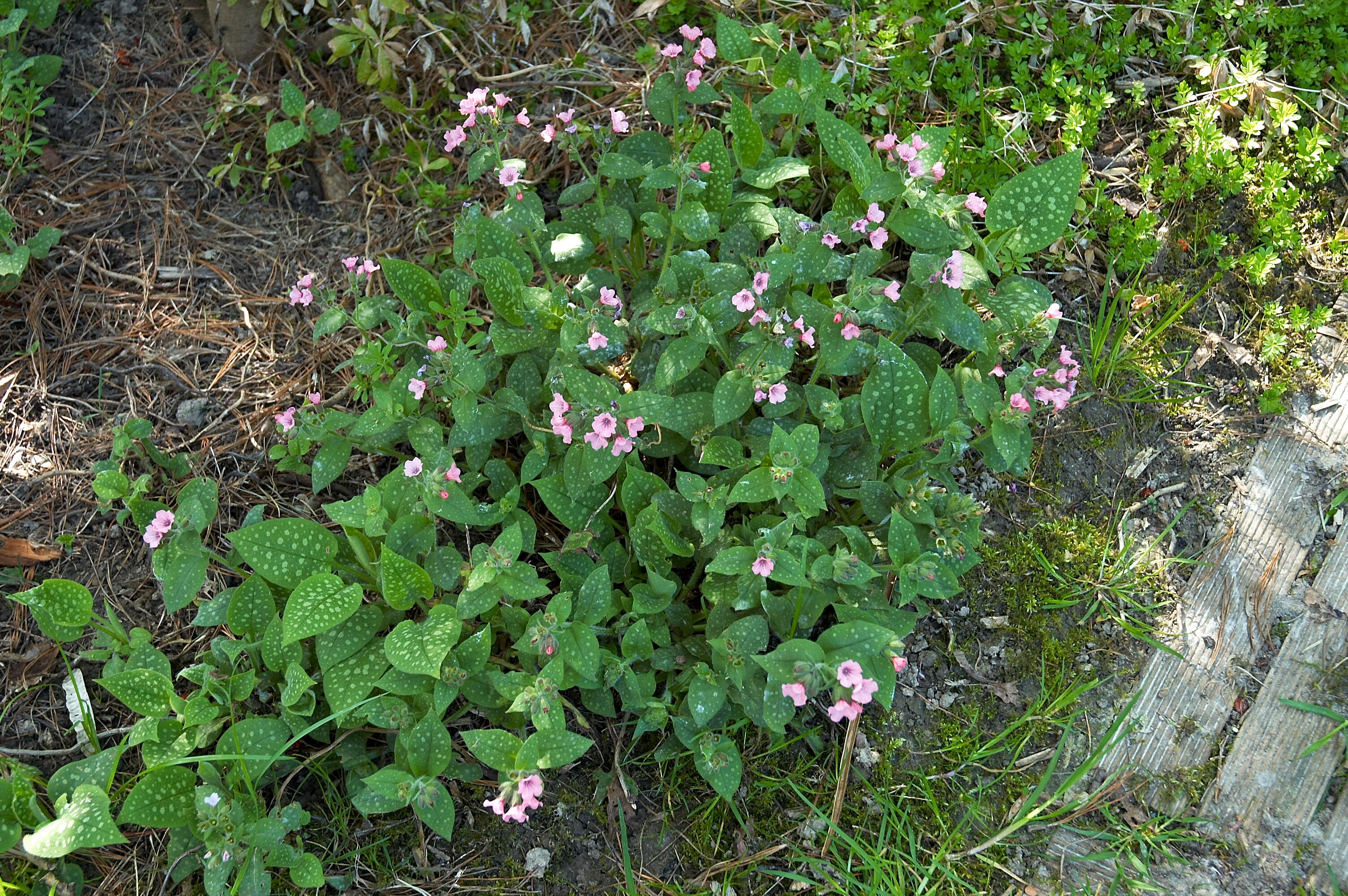 Pulmonaria saccharata (cultivar)